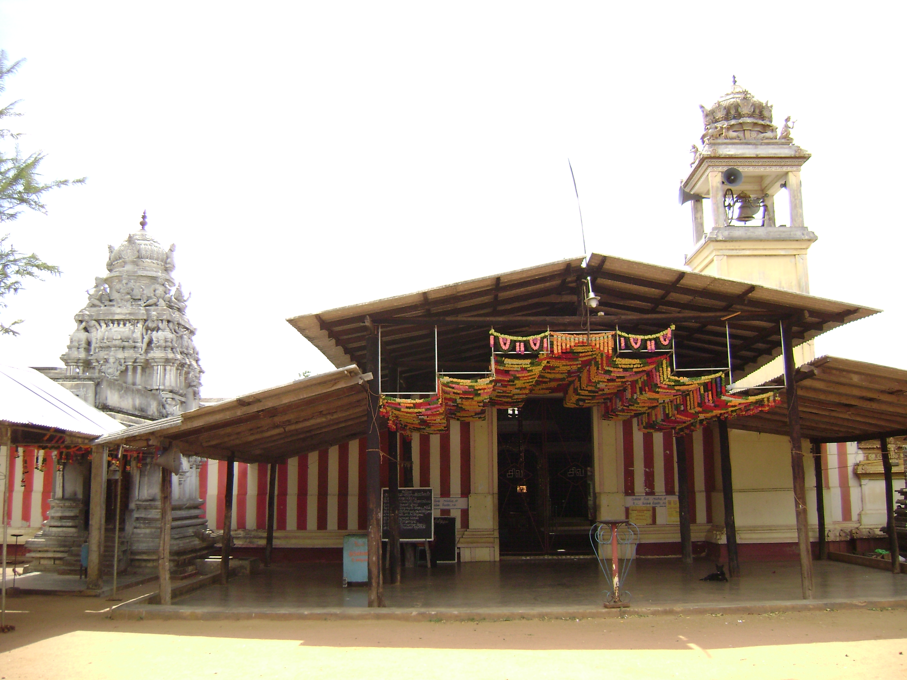 வவுனியா அருள் மிகு அகிலாண்டேஸ்வரி சமேத அகிலாண்சேசுவரர் திருக்கோவில் கோயில்குளம் சிவன் கோயில் முகப்புத் தோற்றம்.